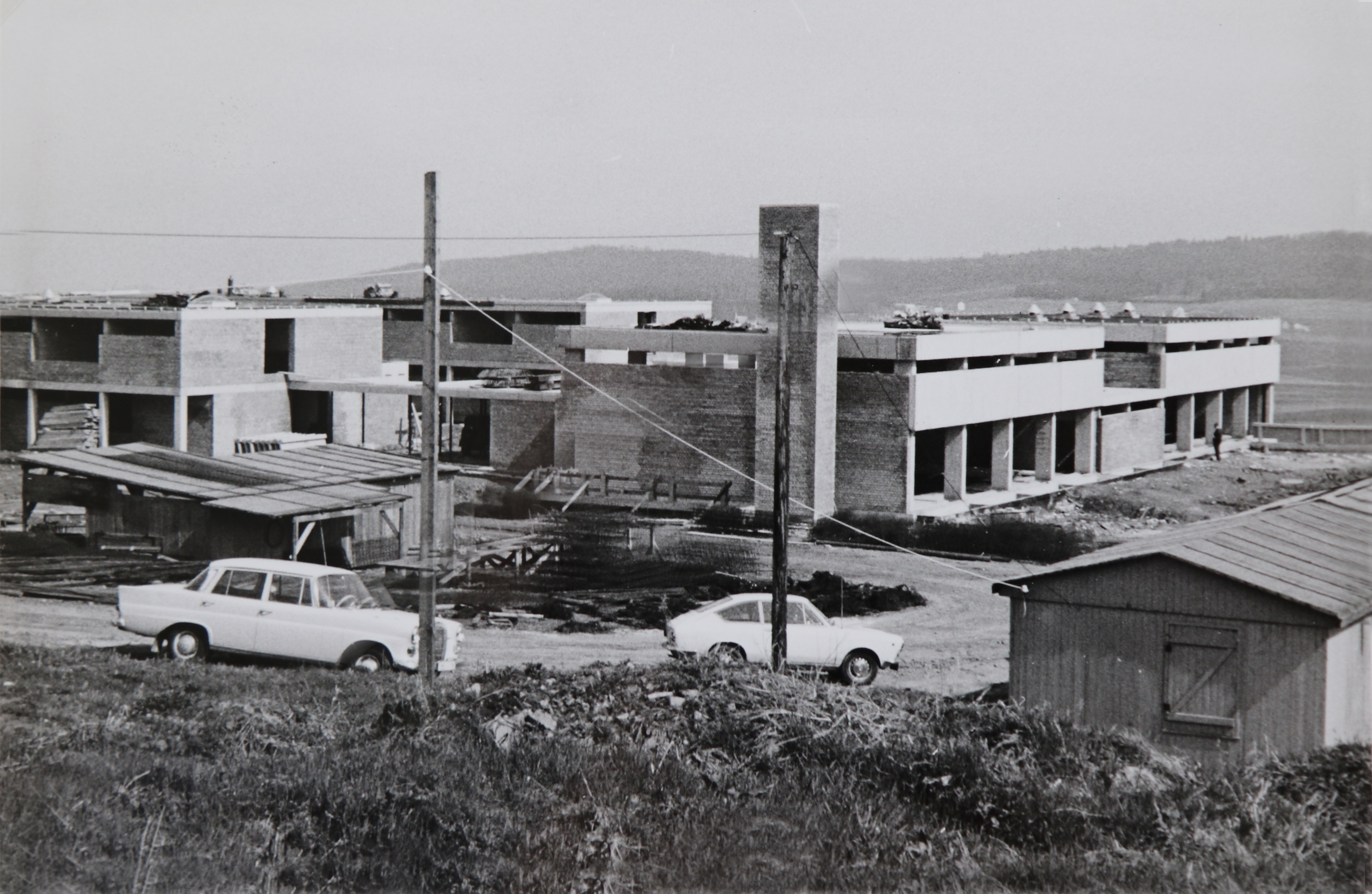 Rehaklinik